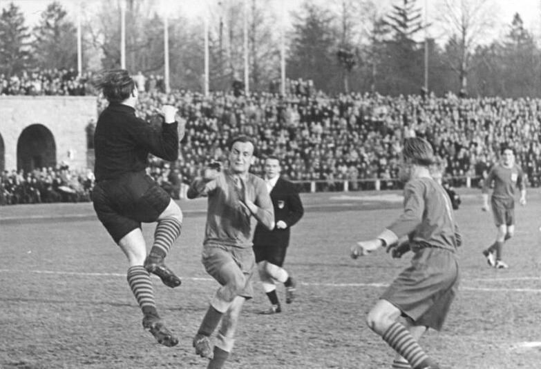 Zentralbild-TED (Wlocka) Wjt-Ho. 29.3.1954 Ausschnitte aus dem Fußballspiel Turbine Erfurt - Fortschritt Meerane (2:1) am 28.3.1954 - UBz: Tumult vor dem Erfurter Tor. Torwart Nitsche (Erfurt) rettete, indem er sich auf den Ball warf.